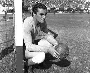 Amadeo Carrizo en el arco jugando para River Plate